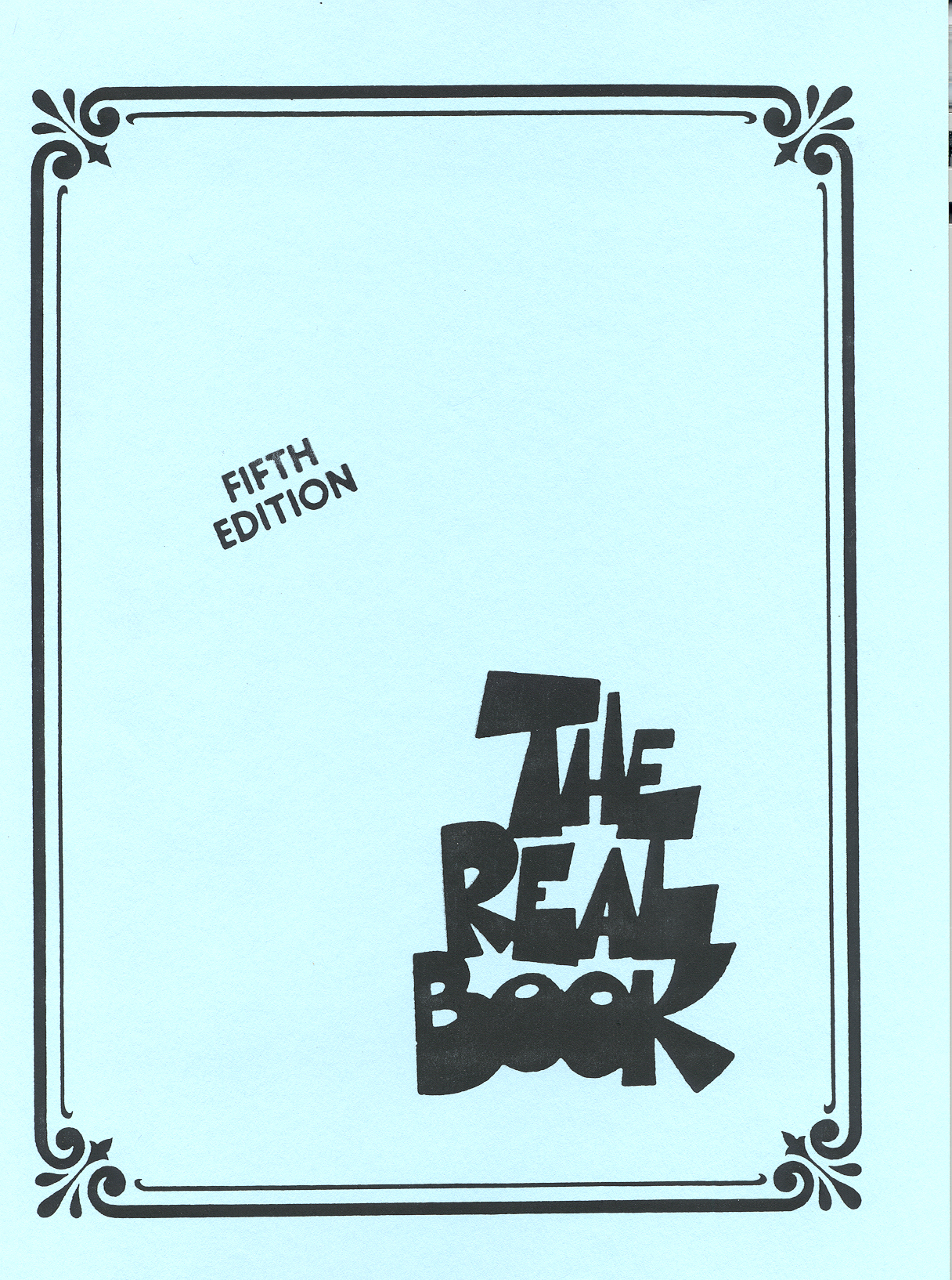 Portada de la quinta edición del Real Book